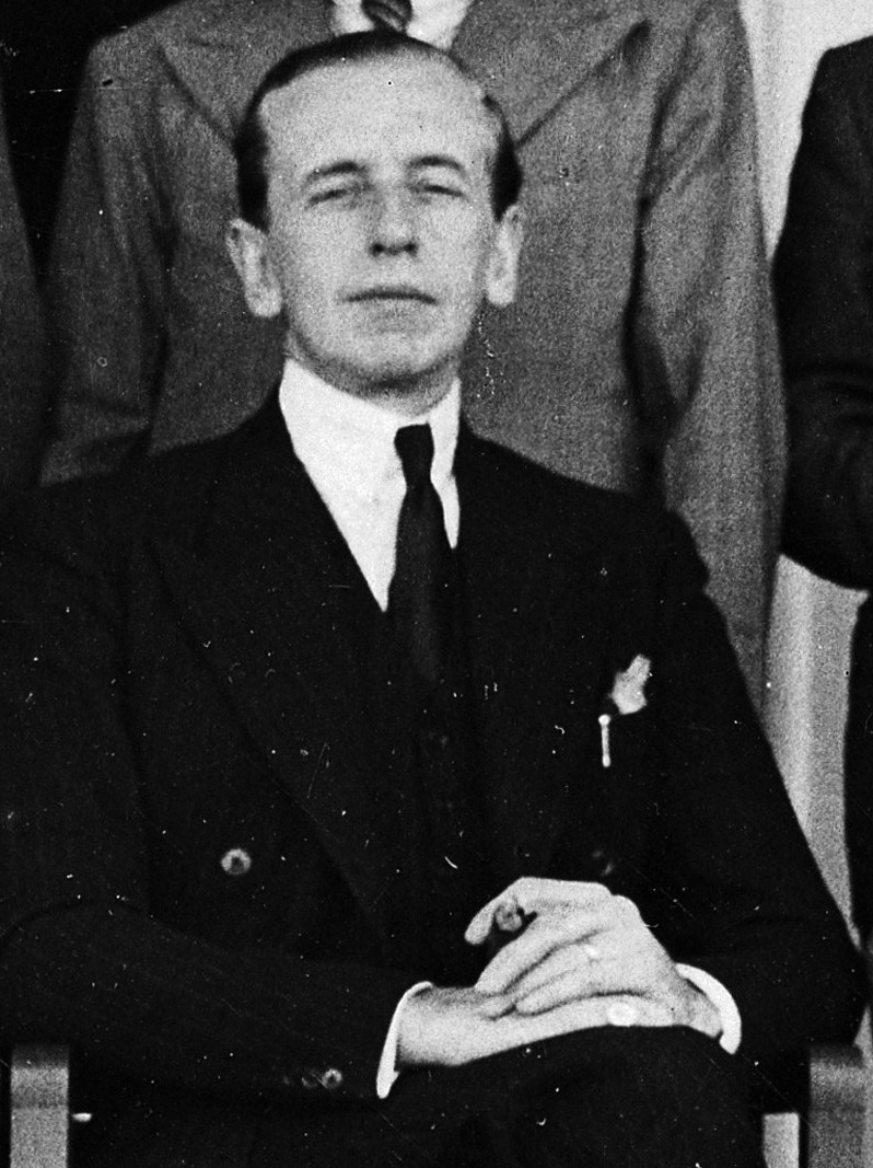 Weldon Dalrymple-Champneys